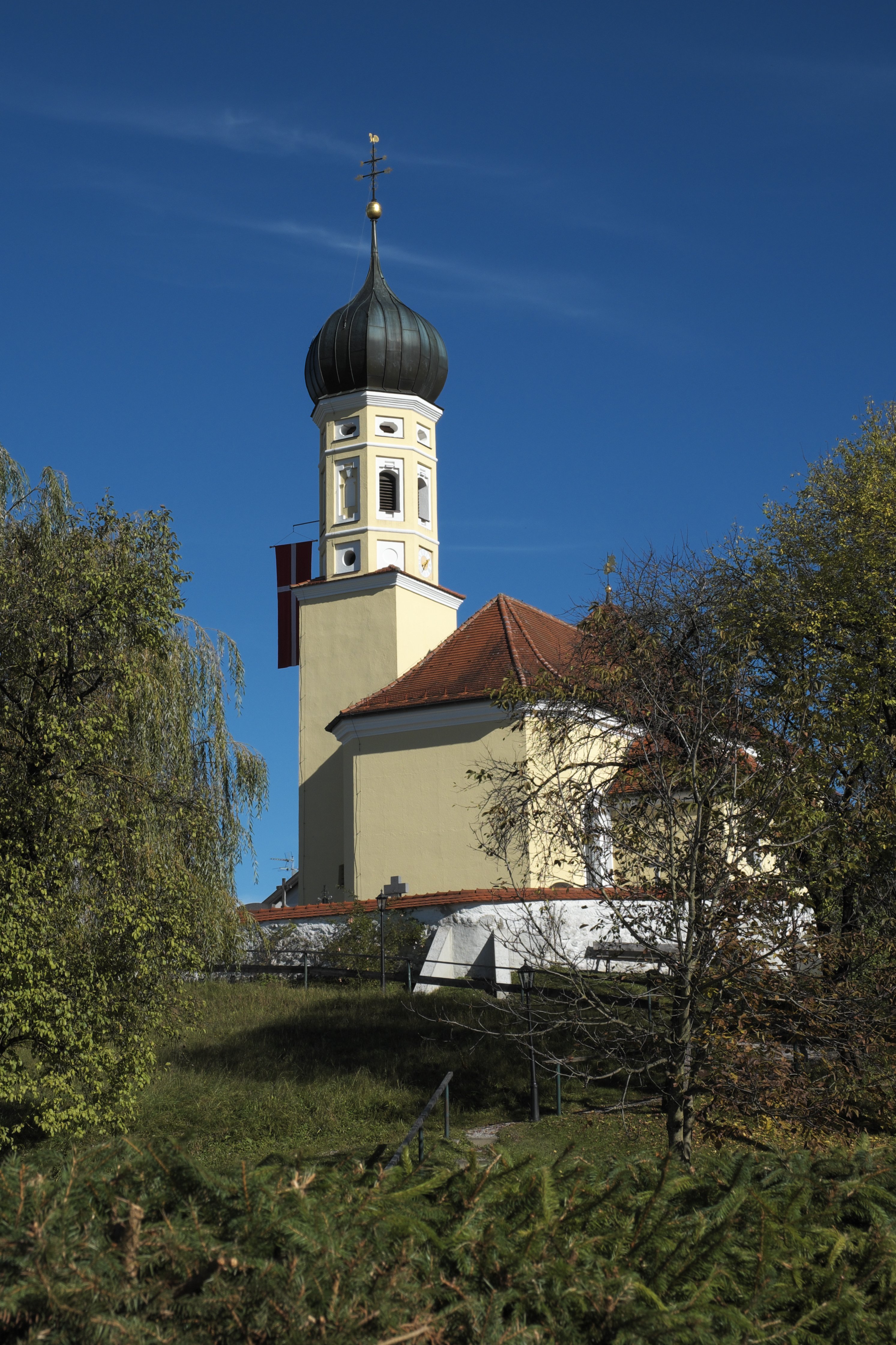 Katholische Kuratiekirche St. Georg in Bichl im Landkreis Bad Tölz-Wolfratshausen (Bayern/Deutschland)